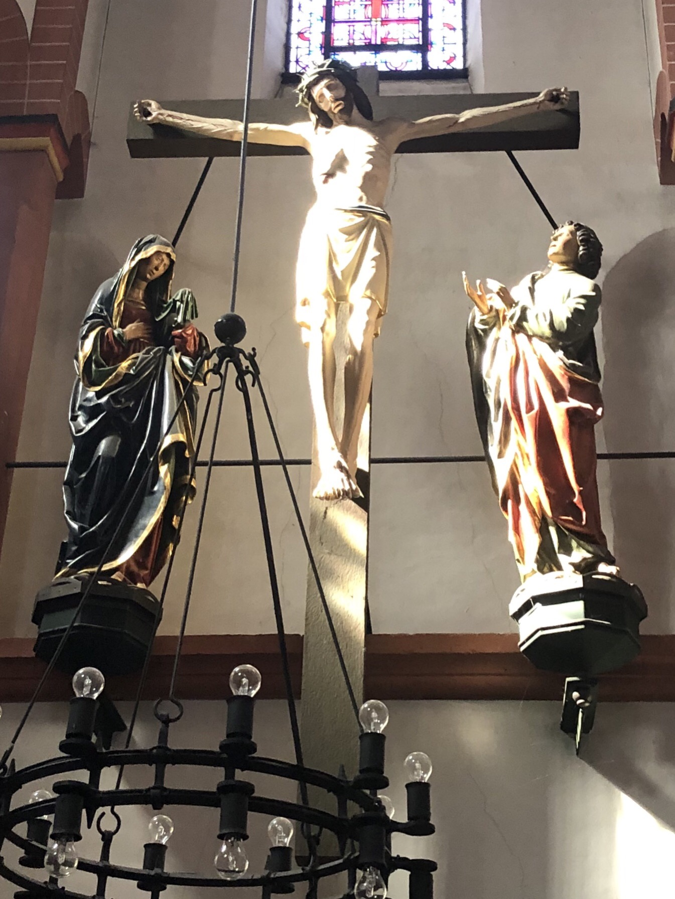 Kunstwerk aus dem 16. Jahrhundert aus Kirche St. Peter Sinzig